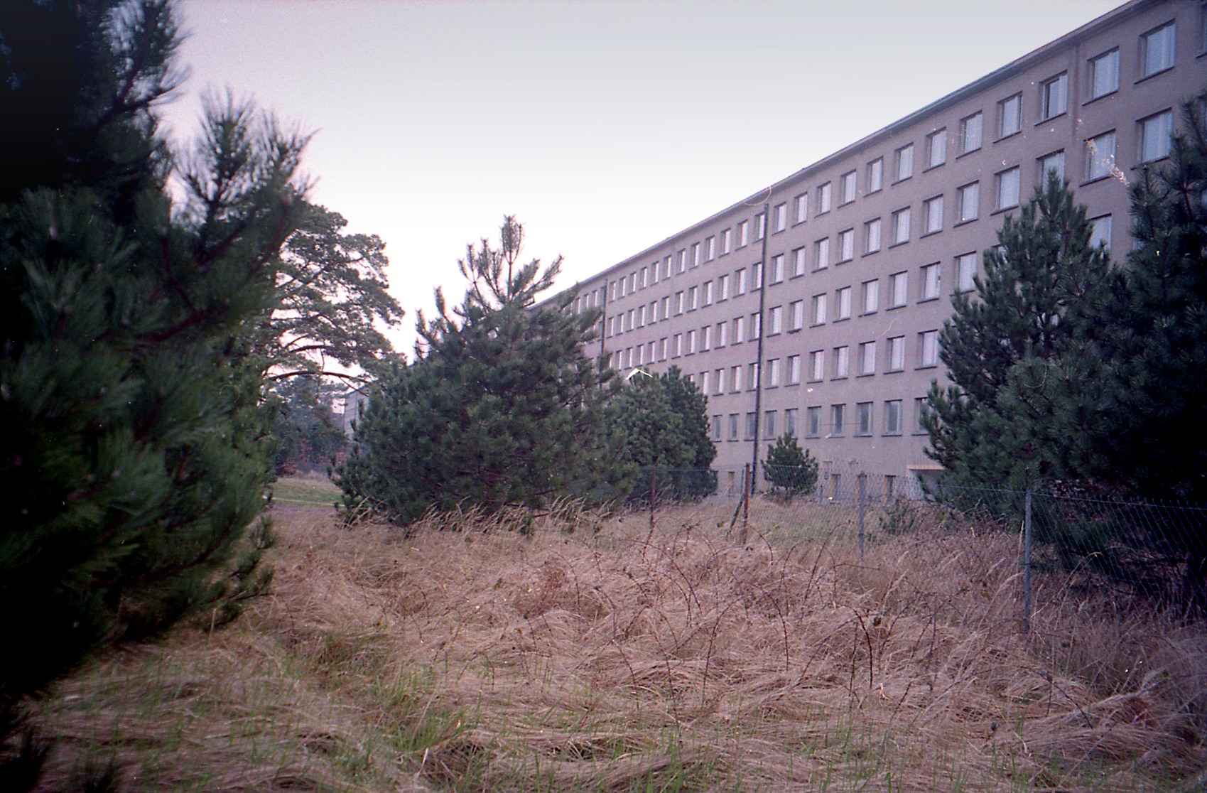 Рюген.Прора.Вид домов отдыха с моря